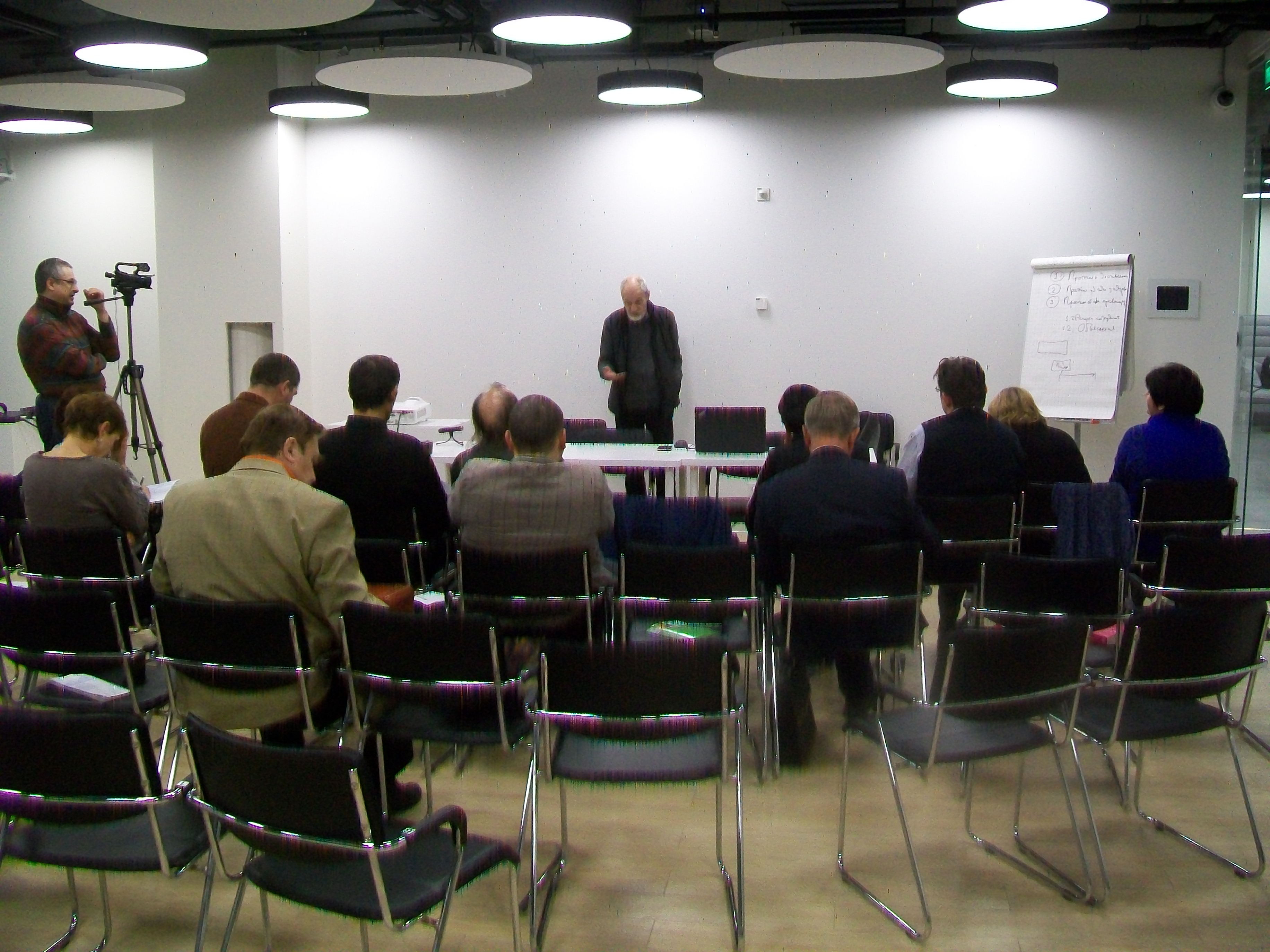 Третий день Школы общественного защитника. Екатеринбург, 23 октября 2017 года